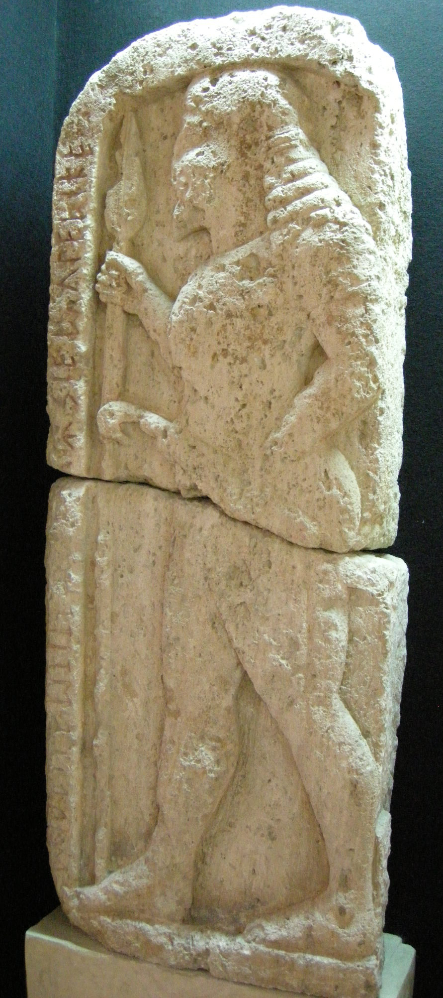 Museo guarnacci, stele di avile tites